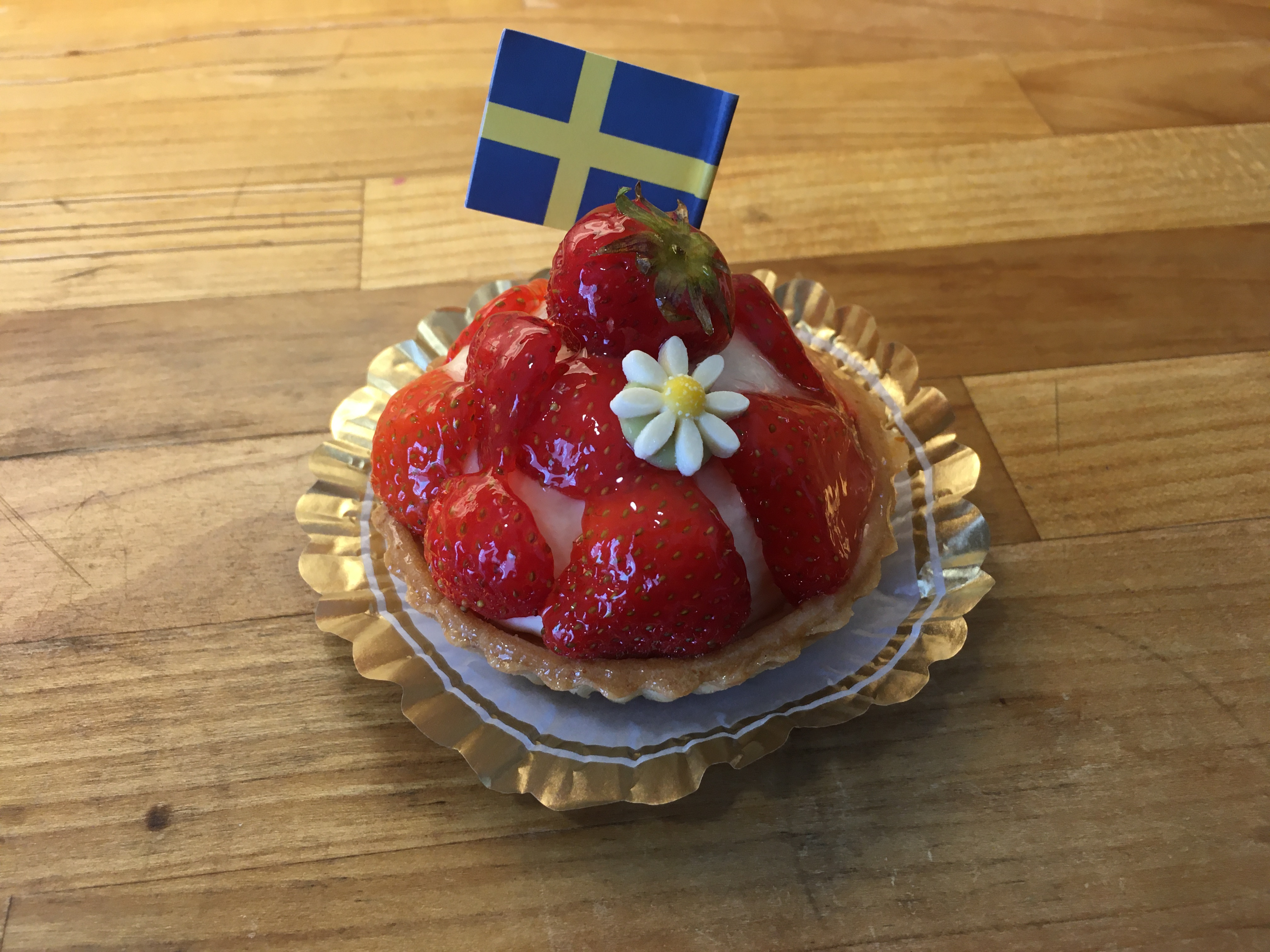 Nationaldagsbakelse köpt i butik den 6:e juni 2020. Bilden är tagen i ett hem i Stockholm.